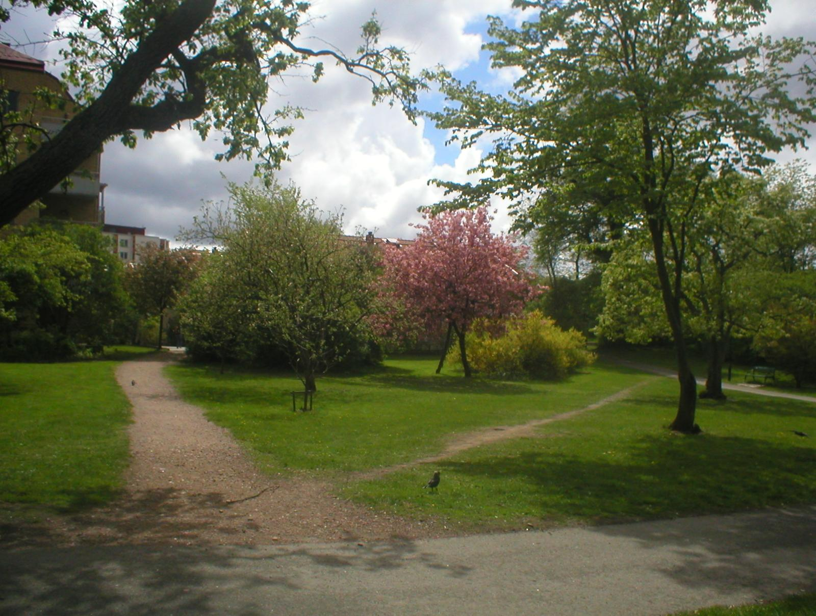 Foto av Gathenhielmska trädgården, Göteborg, taget av Per Johansson 2005.